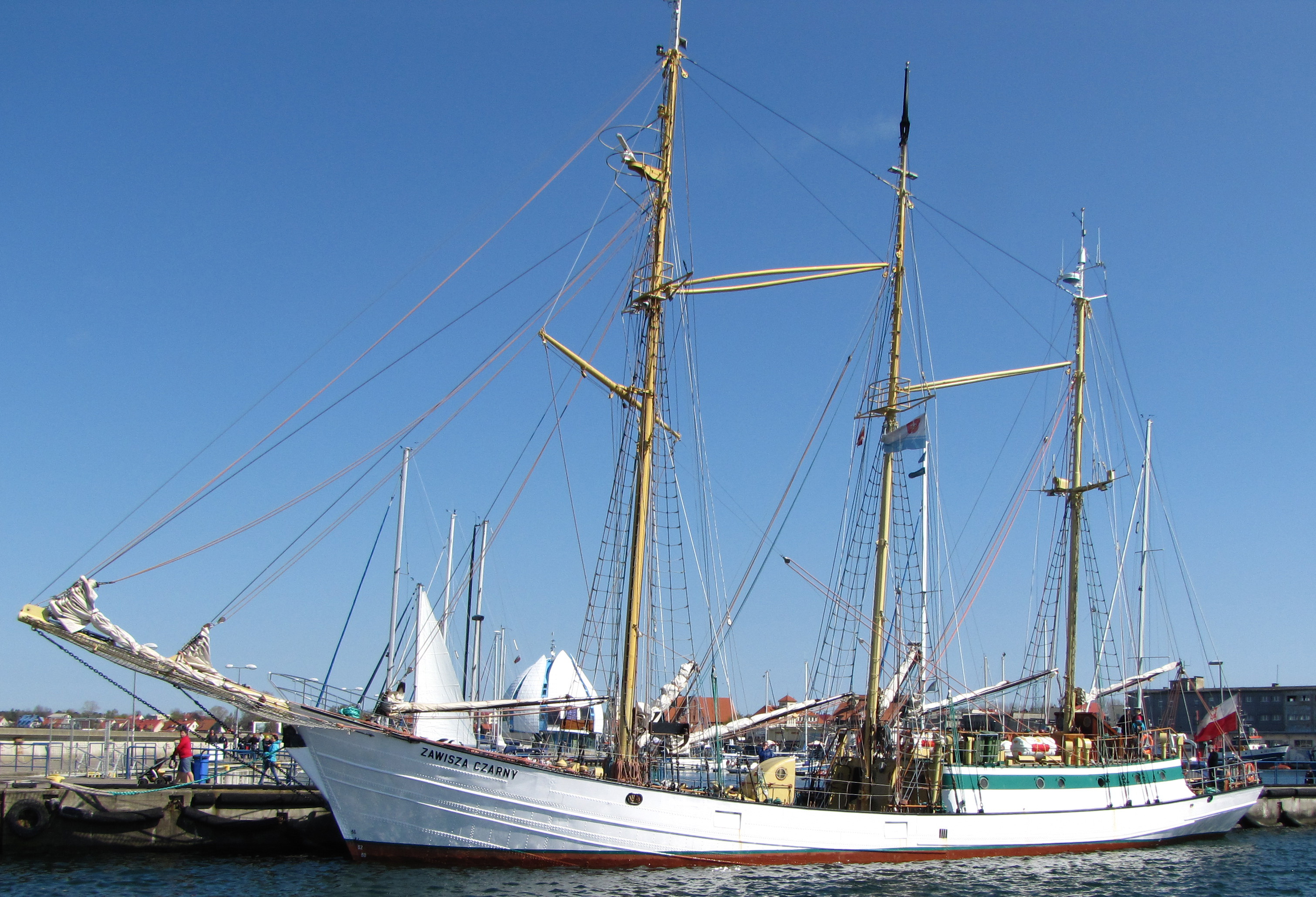 port w Helu, maj 2015